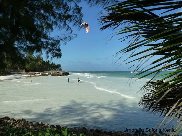 Der schönste Strand Afrikas, Diani Beach